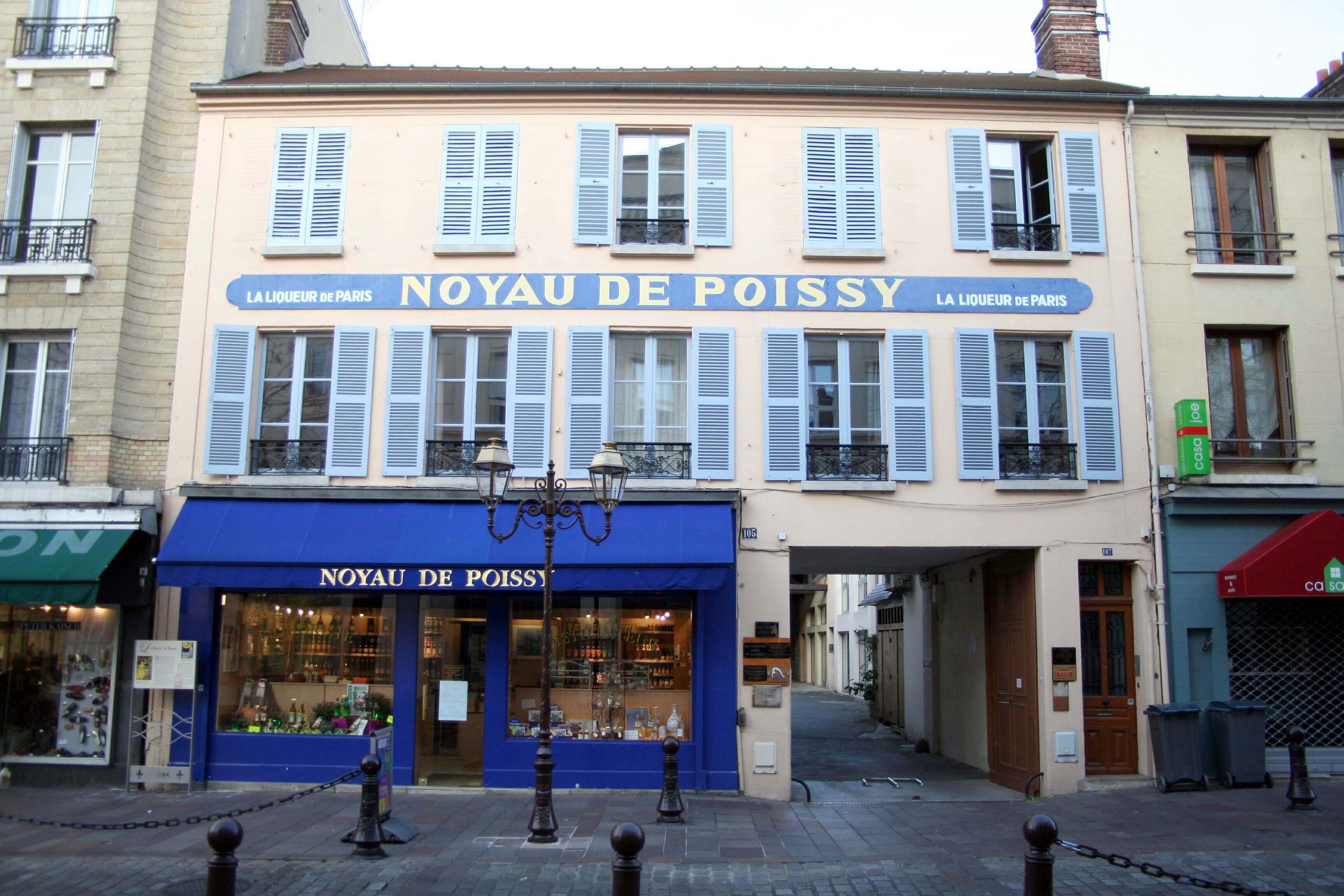 Maison du « noyau de Poissy » à Poissy - Yvelines (France)